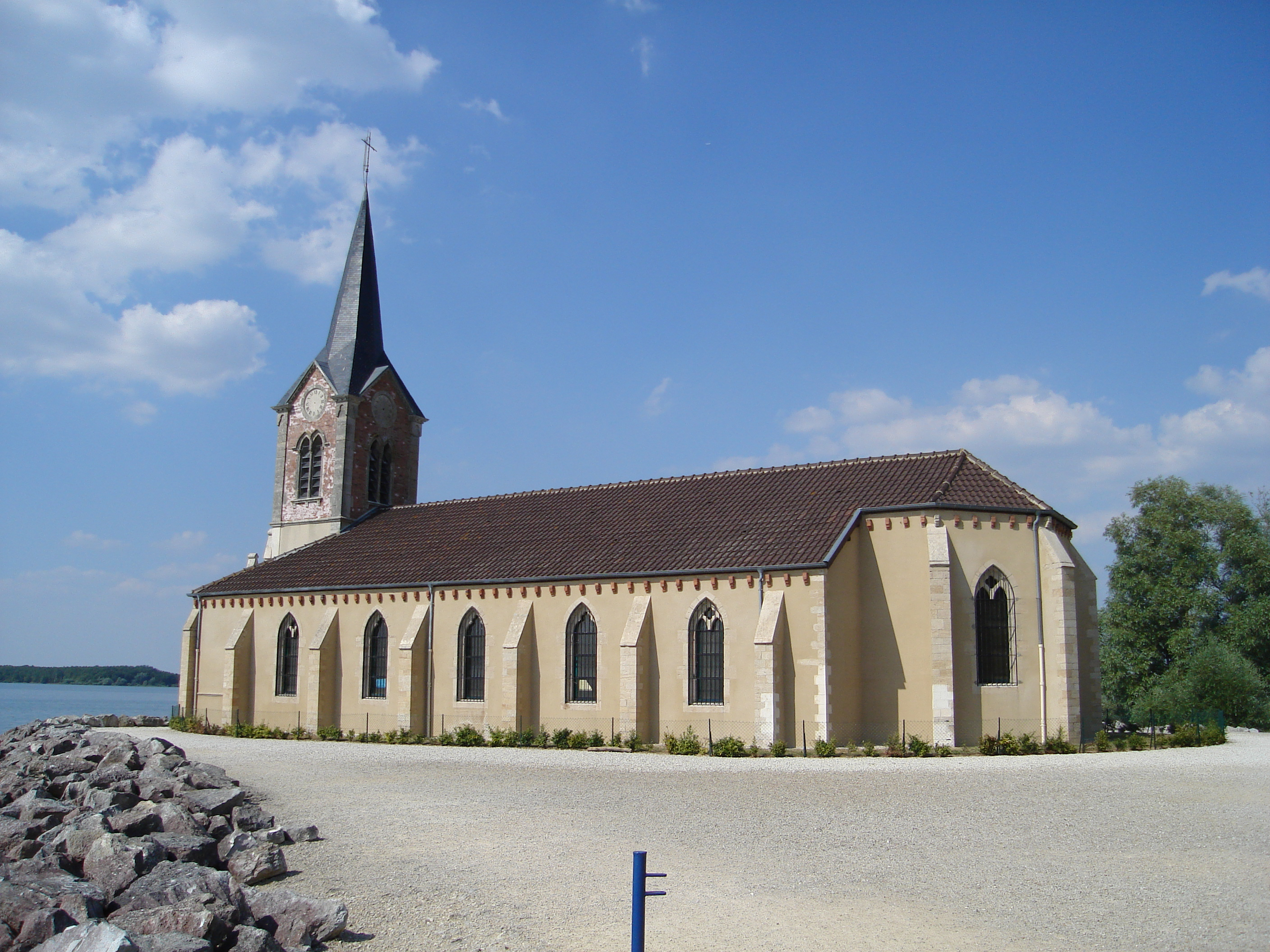 st dizier lac du der